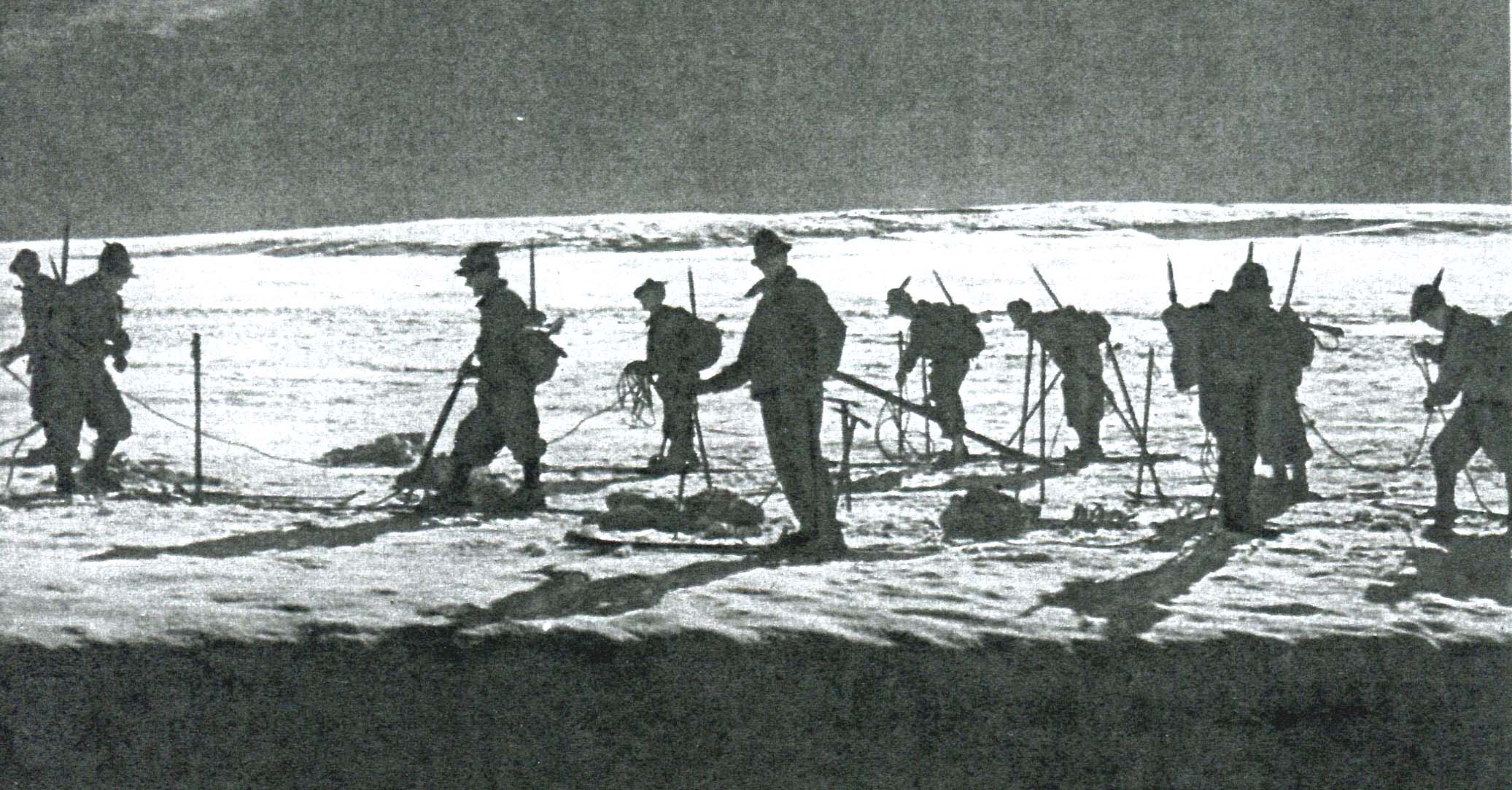 Quelli della montagna (Vergano e Blasetti) - foto scena ghiacciaio